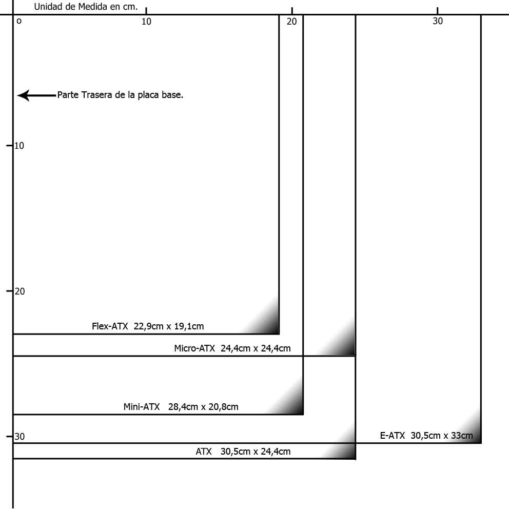 Dimensiones de los distintos formatos de las placa base ATX.